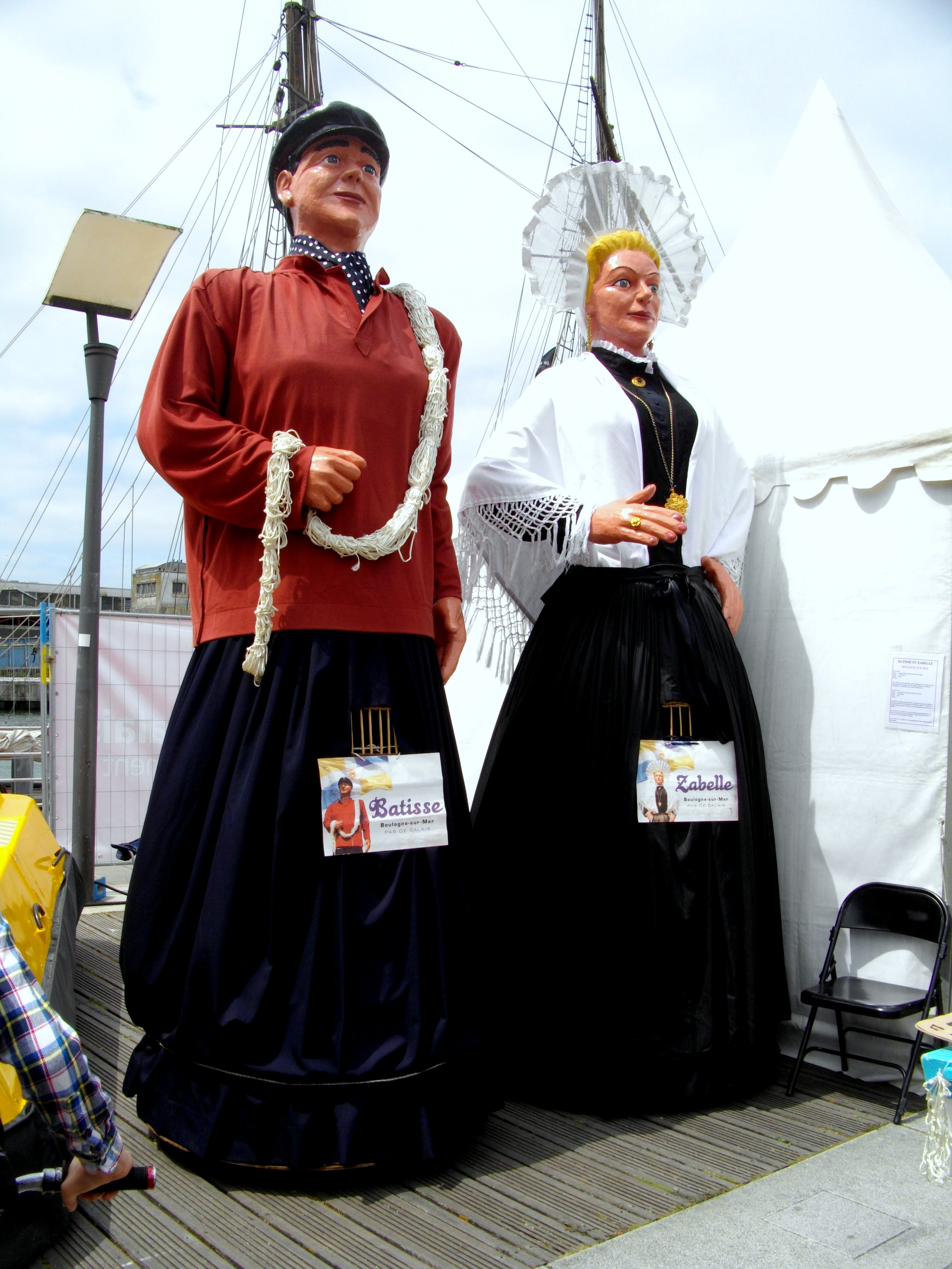 Fête de la mer (Boulogne, 2013). Les célèbres BATISSE et ZABELLE